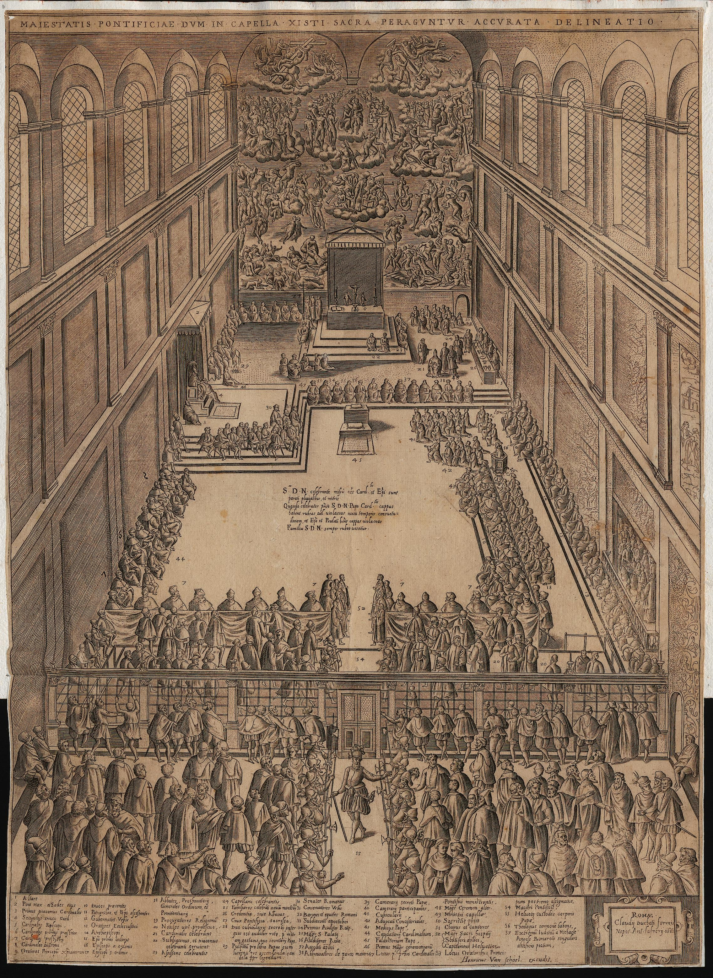 Grafik aus dem Klebeband Nr. 15 der Fürstlich Waldeckschen Hofbibliothek Arolsen Motiv: "Maiestatis Pontificiae Dum in Capella Xisti Sacra Peraguntur Accurata Delineatio" "Romae Claudij bucheti formis Nepot. Ant. Safrerij 1582"